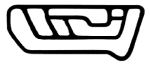 Desenho do traçado total do Kartódromo Júlio Ventura